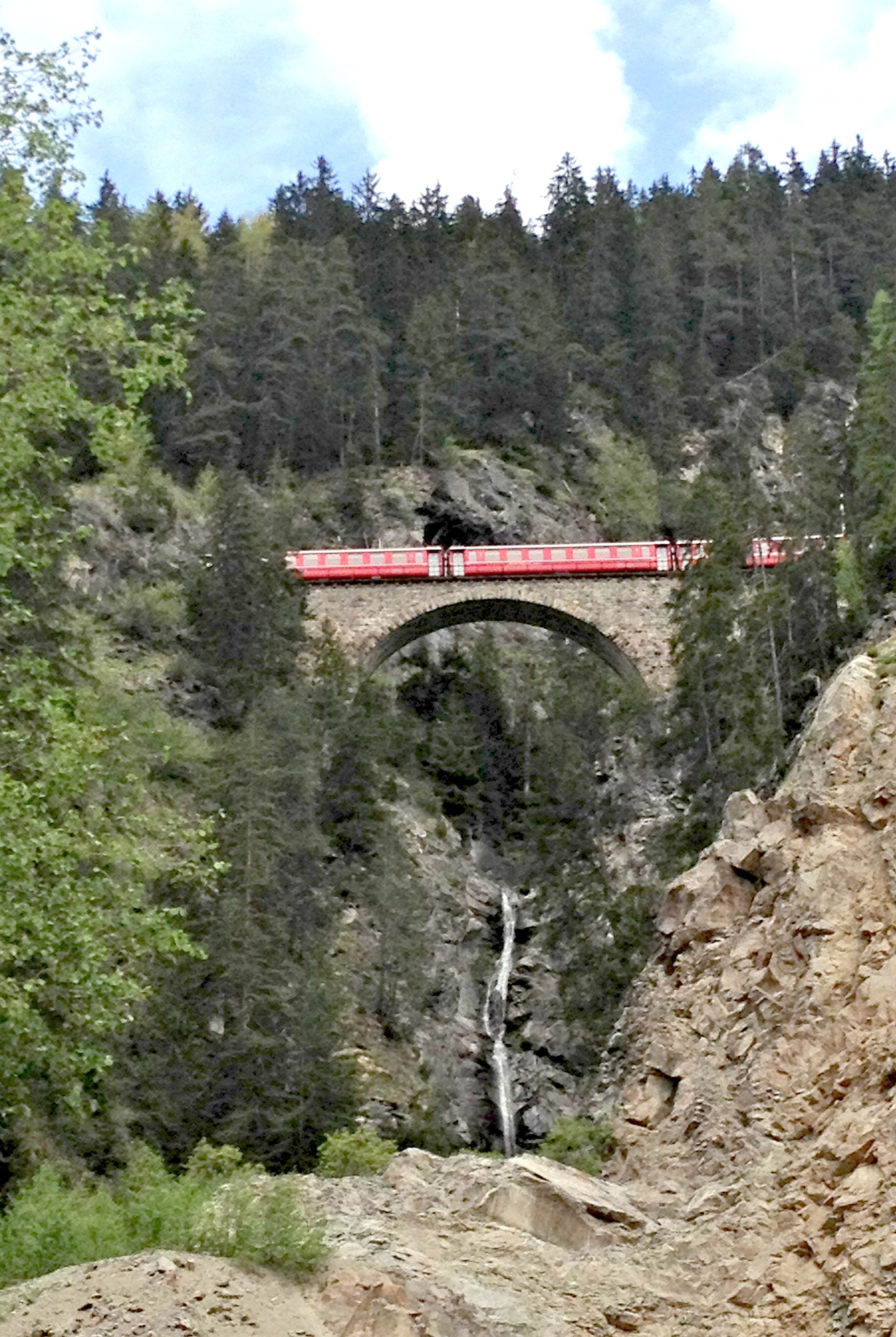 Ava da Stugl